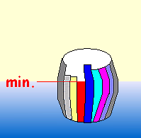 Illustration zum "Minimum-Gesetz" nach Justus von Liebig - die Flüssigkeit in einem Faß kann nur so hoch steigen, wie die kürzeste Daube hoch ist.